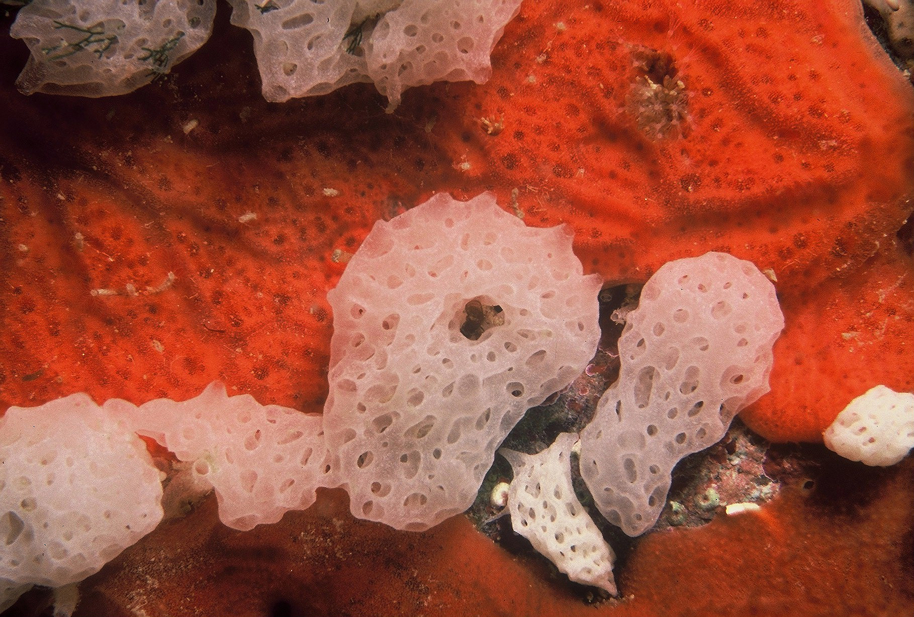 Clathrina coriacea (Montagu, 1818), Spirastrella cunctatrix Schmidt, 1868 - Banyuls-sur-Mer : 07/88